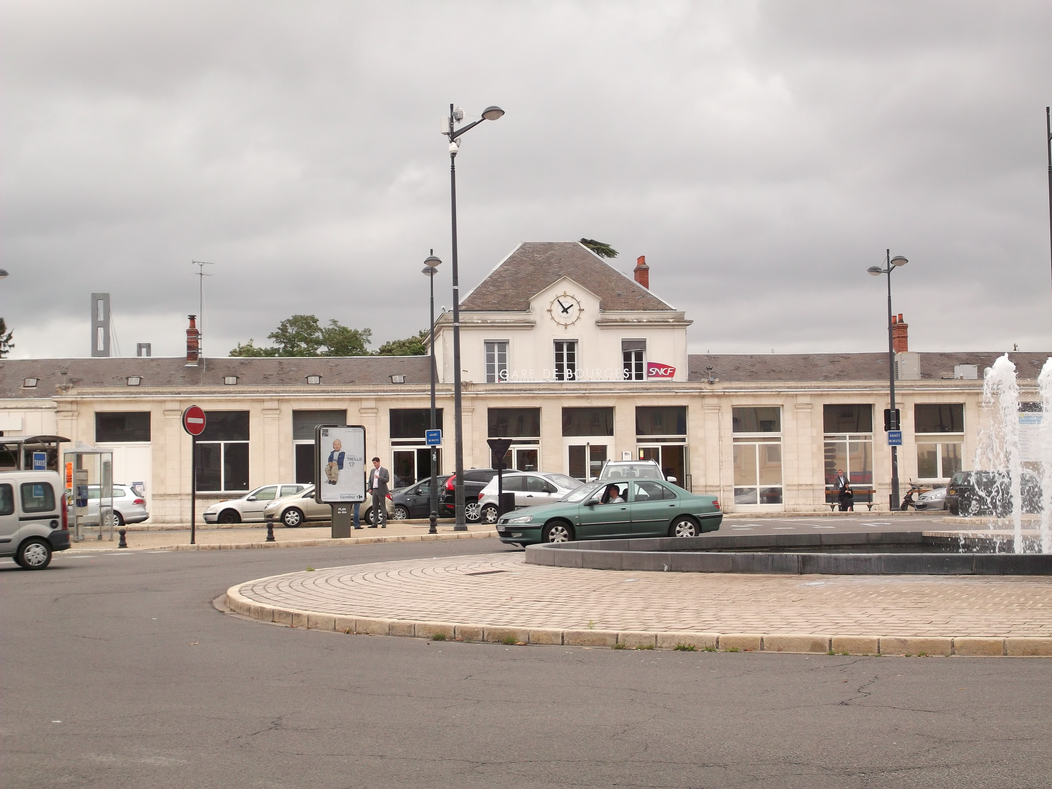 Gare de Bourges, vue extérieur